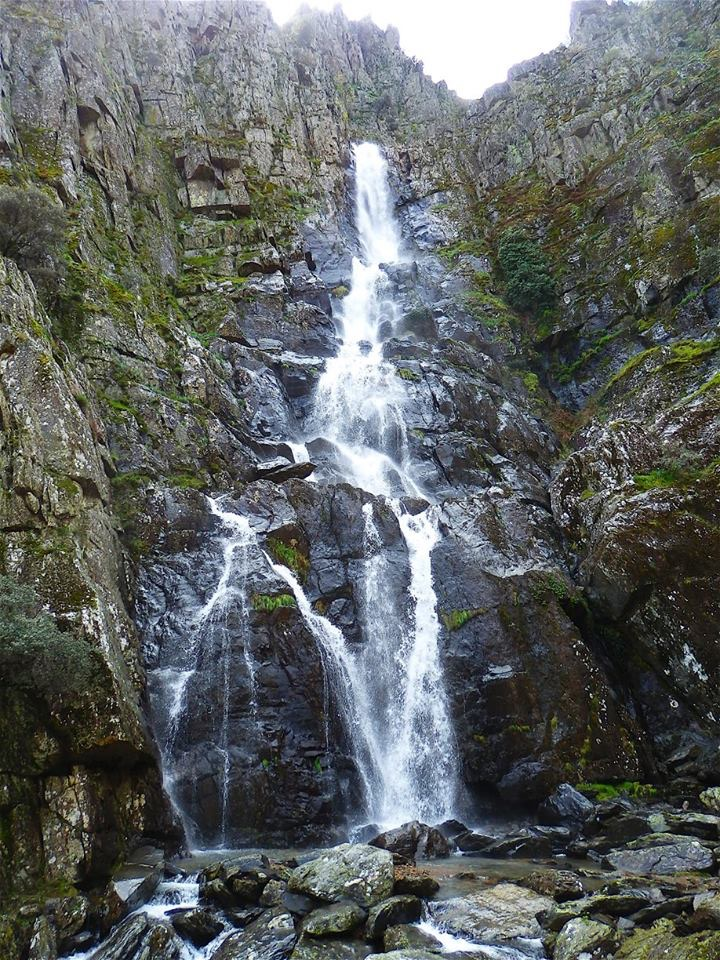 Cascada cerca de El Gasco